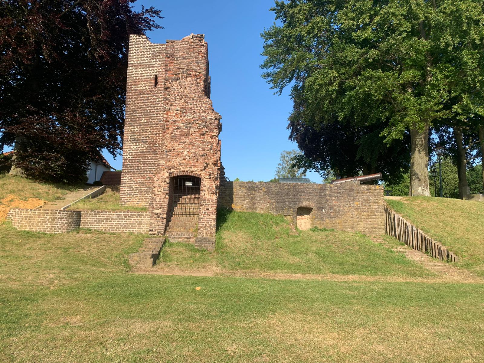 Zollturm in Arcen, Niederlande